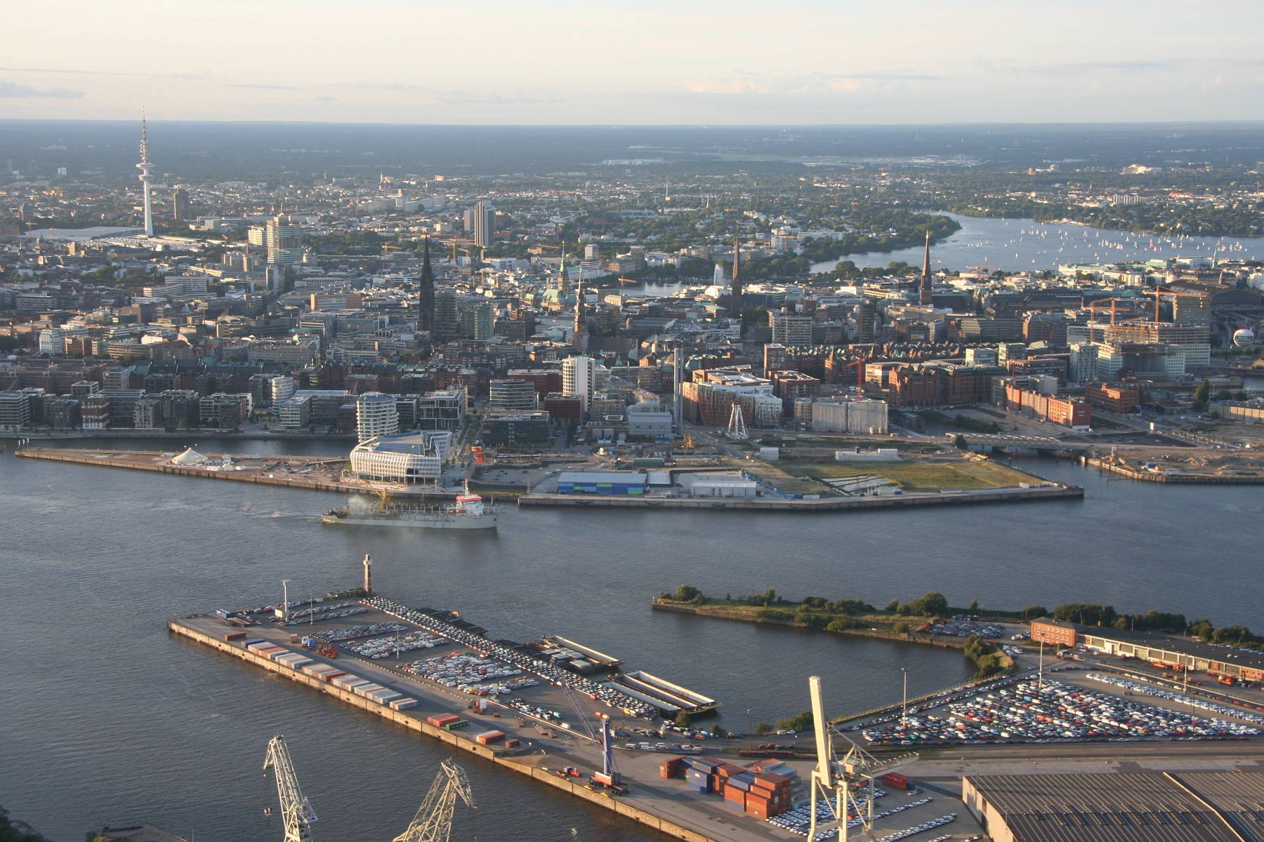 Grasbrook und Speicherstadt